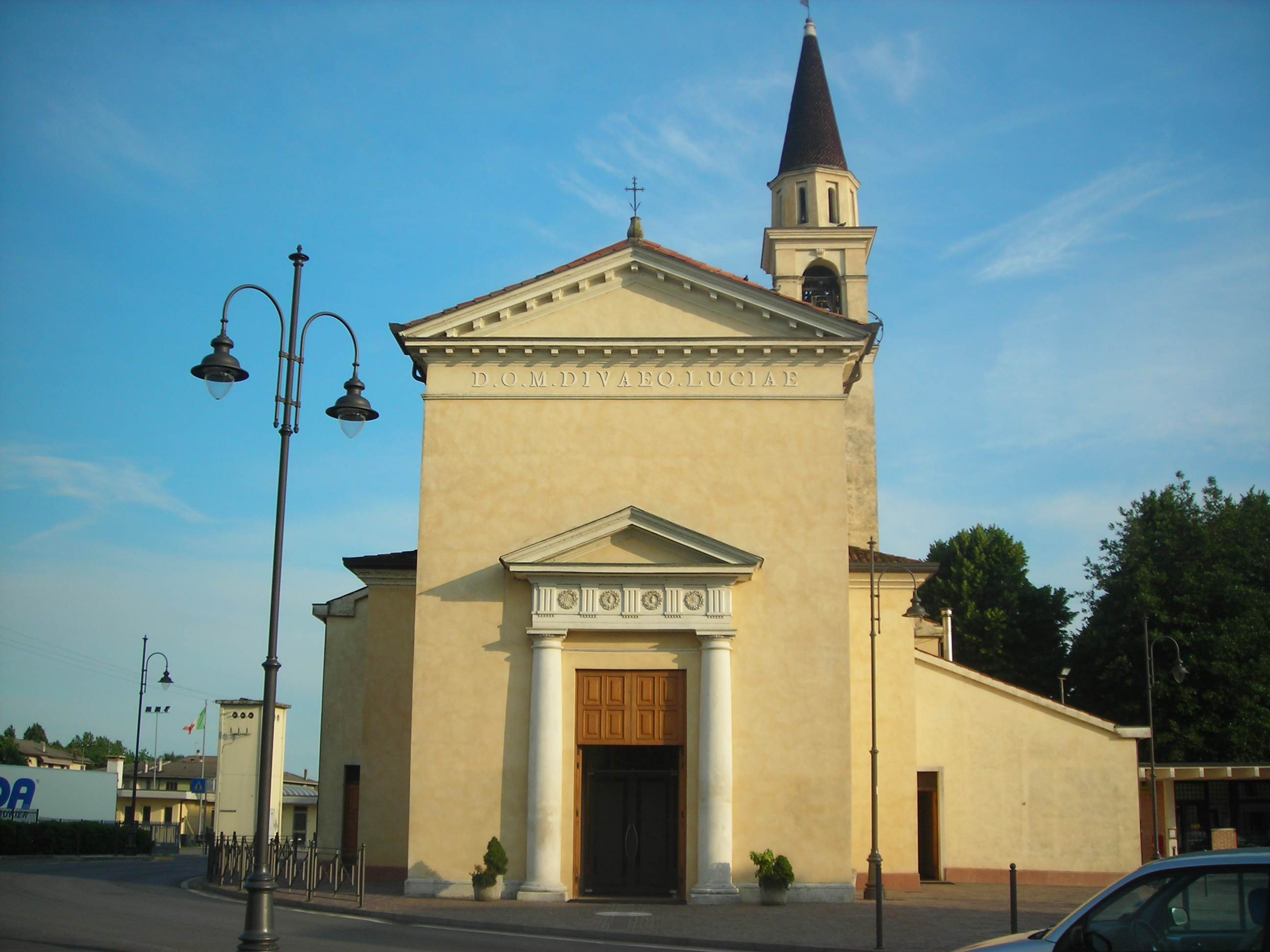 Chiesa di Santa Lucia a Lisiera di Bolzano Vicentino in provincia di Vicenza